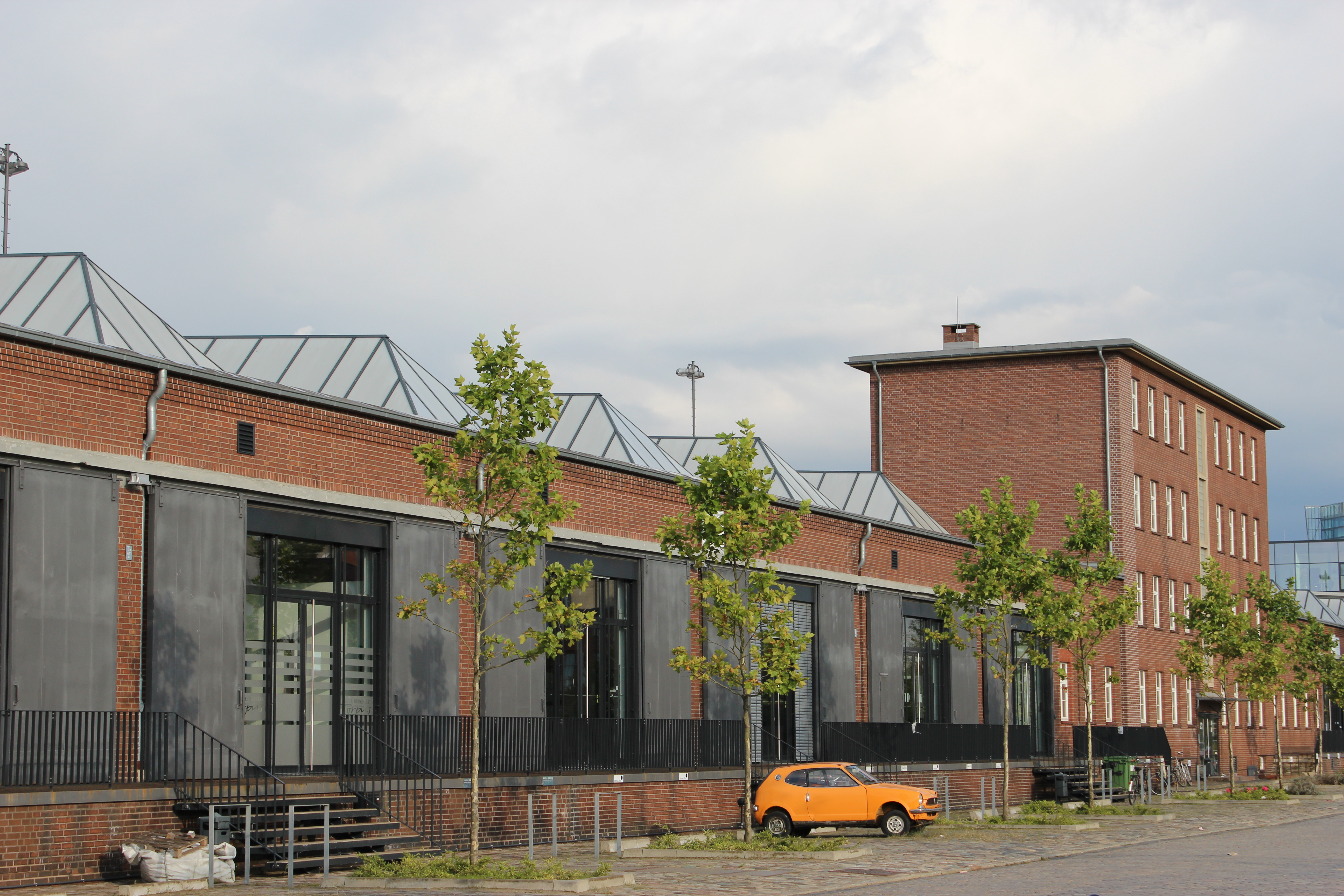 Schuppen 2 in Bremen, Hoerneckestraße 2.Das abgebildete Objekt ist ein geschütztes Kulturdenkmal in der Freien Hansestadt Bremen, mit der Nr. 1757 beim Landesamt für Denkmalpflege registriert.